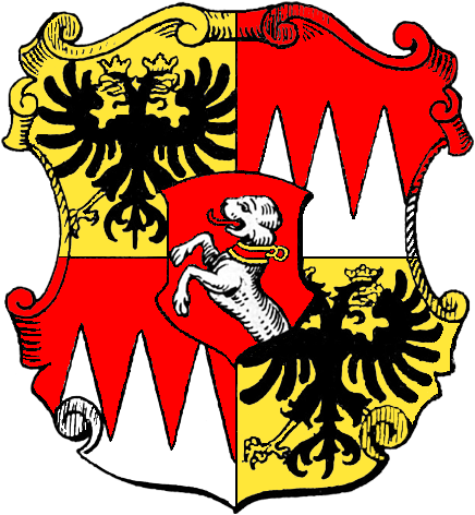 Schild des Wappens der Grafen von Attems von 1630, gemäß Blasonierung koloriert